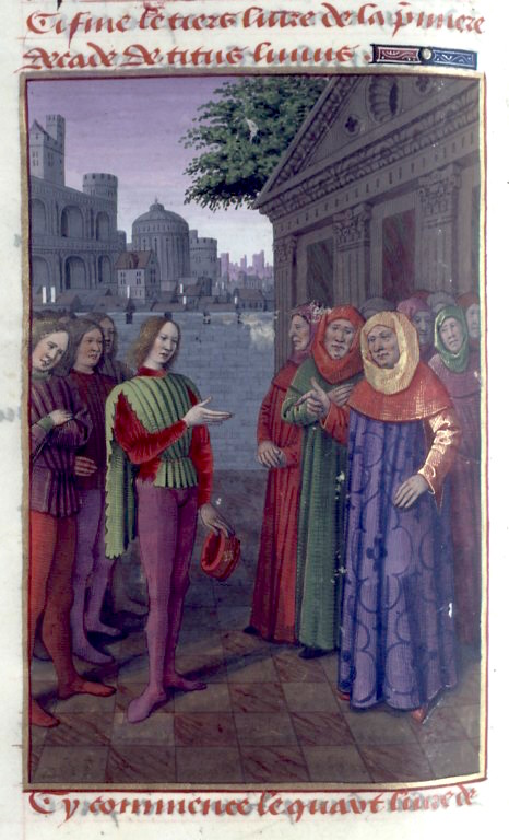 BnF Français 273-274 Tite-Live de Versailles, fol. 130v, Canuleius devant le Sénat